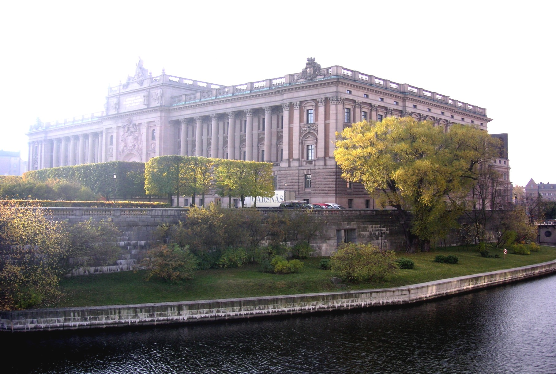 Helgeandshlmen i Stockholm år 2007